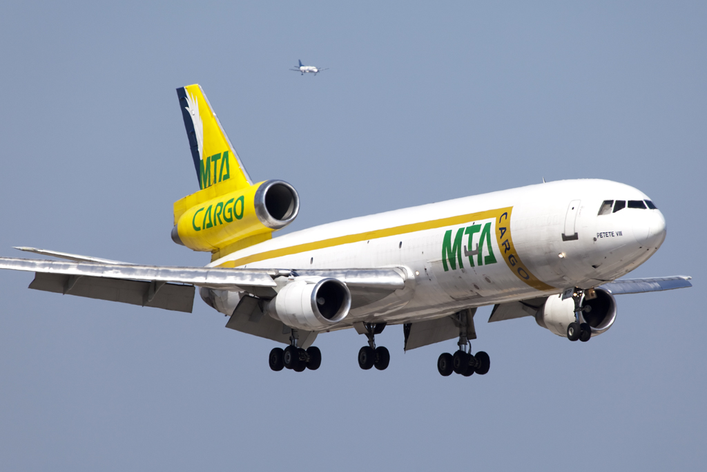 Miami International